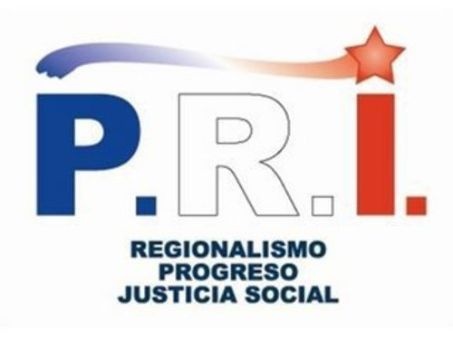 Primer Logo Partido Regionalista de los Independientes (PRI).